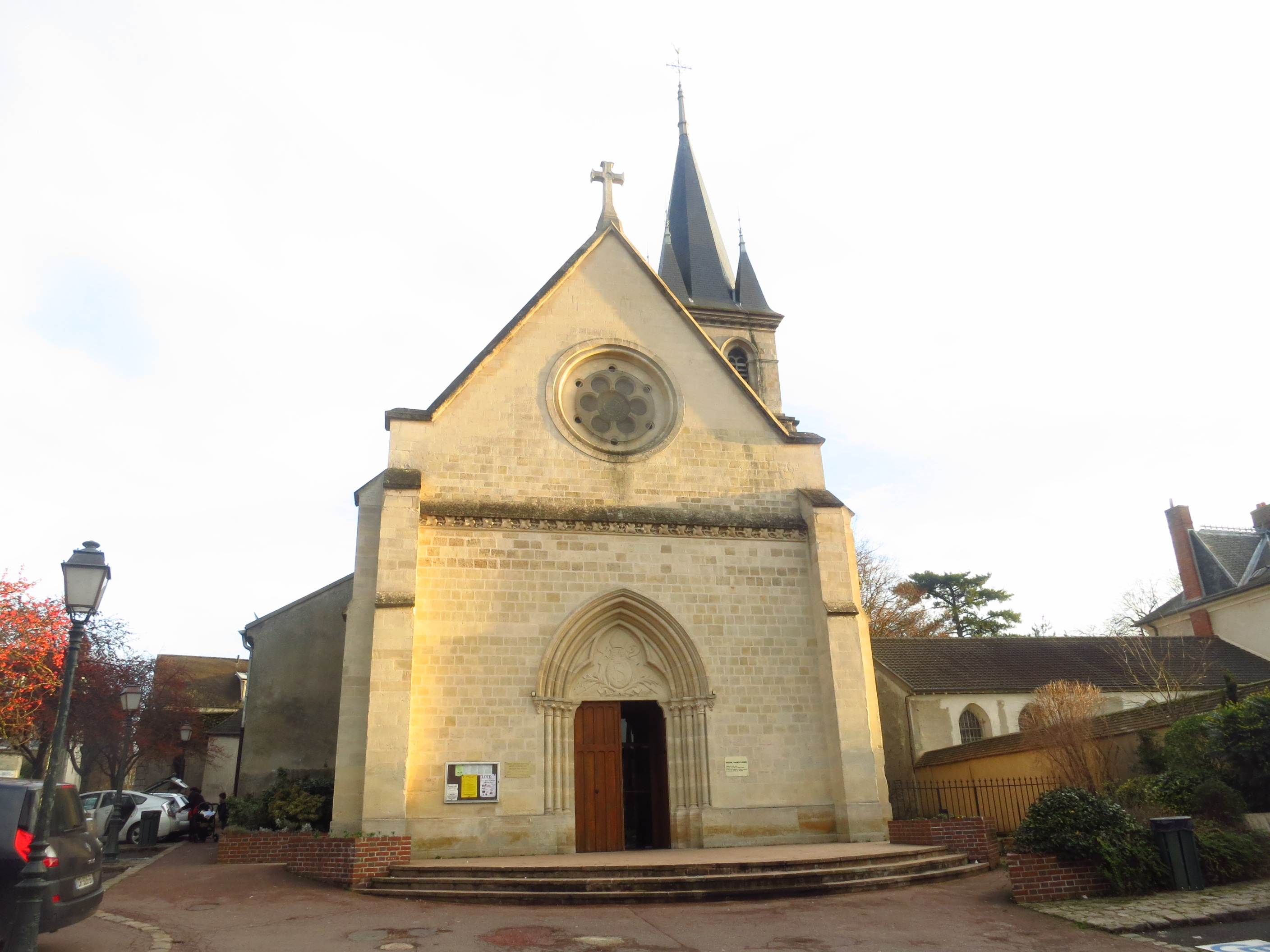 Chiesa di Saint Léger (Boissy-Saint-Léger)